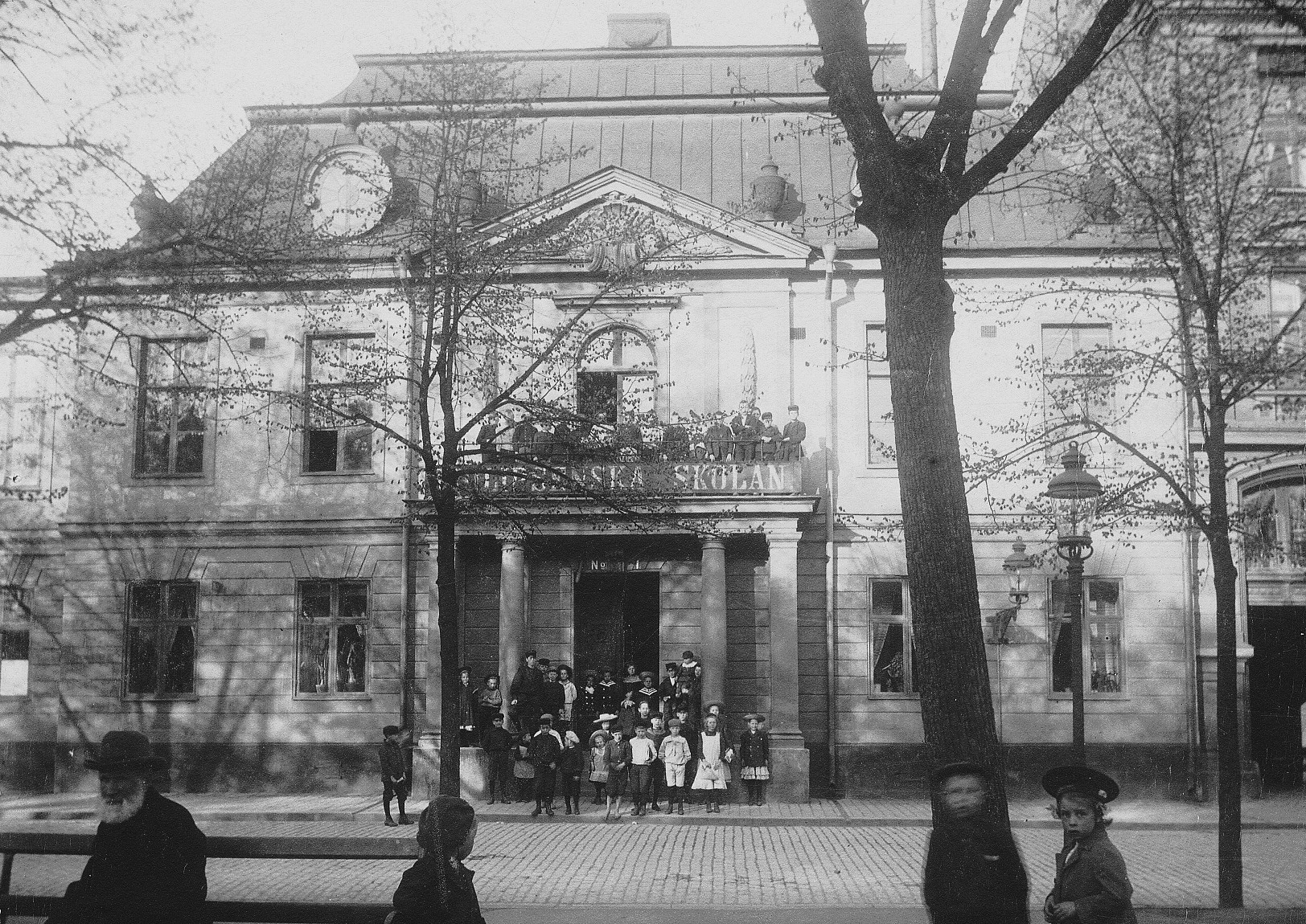 Sutherska huset (rivet 1910) vid Mariatorget.